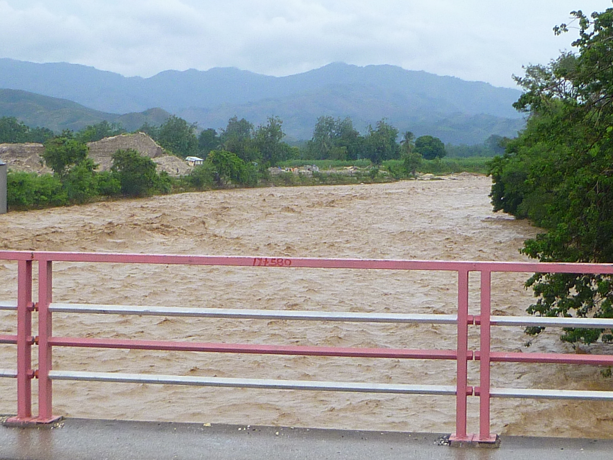 Pon de Brache, Léogâne